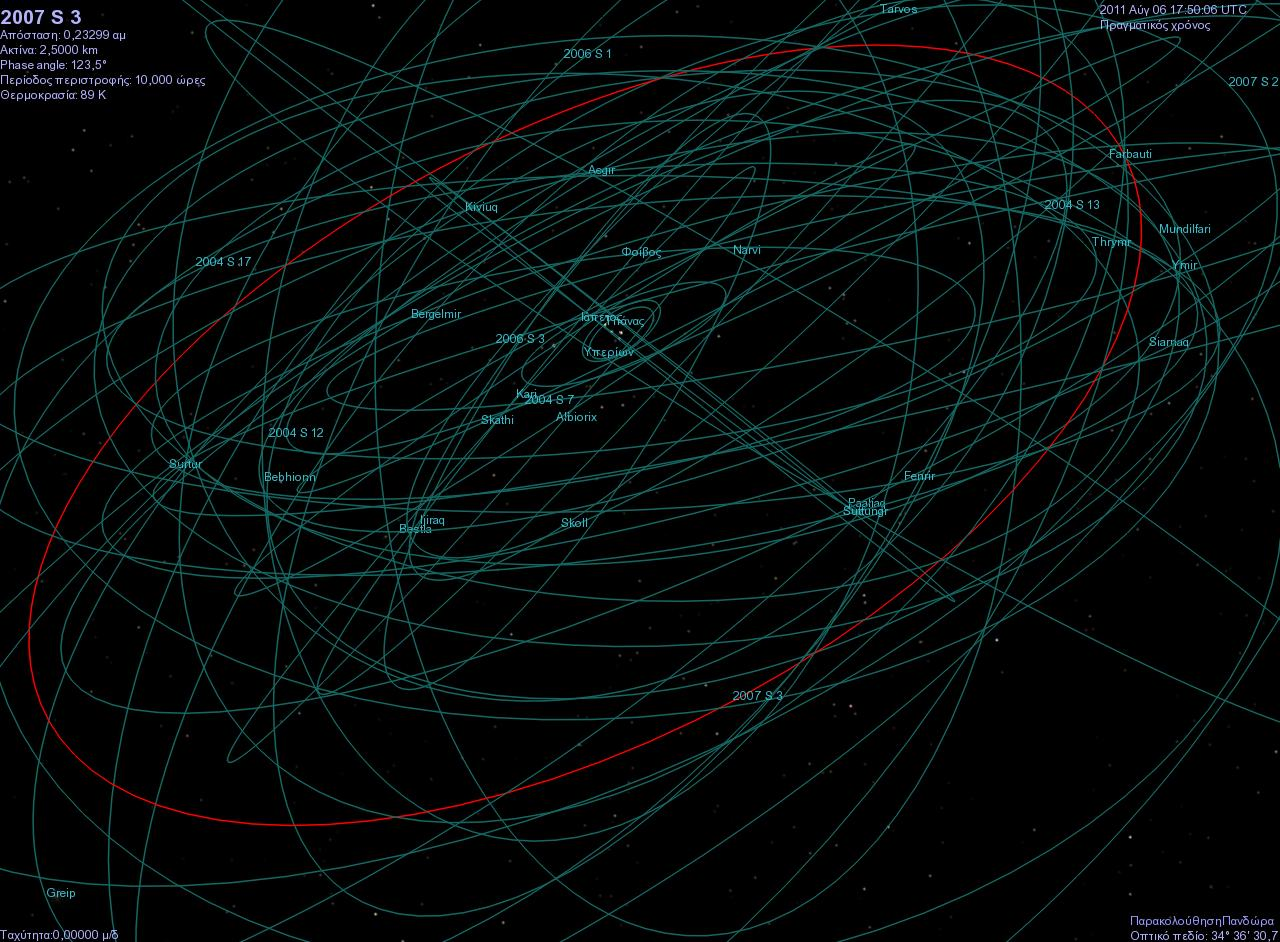 Saturni kuu S/2007 S3 orbiit (punasega)